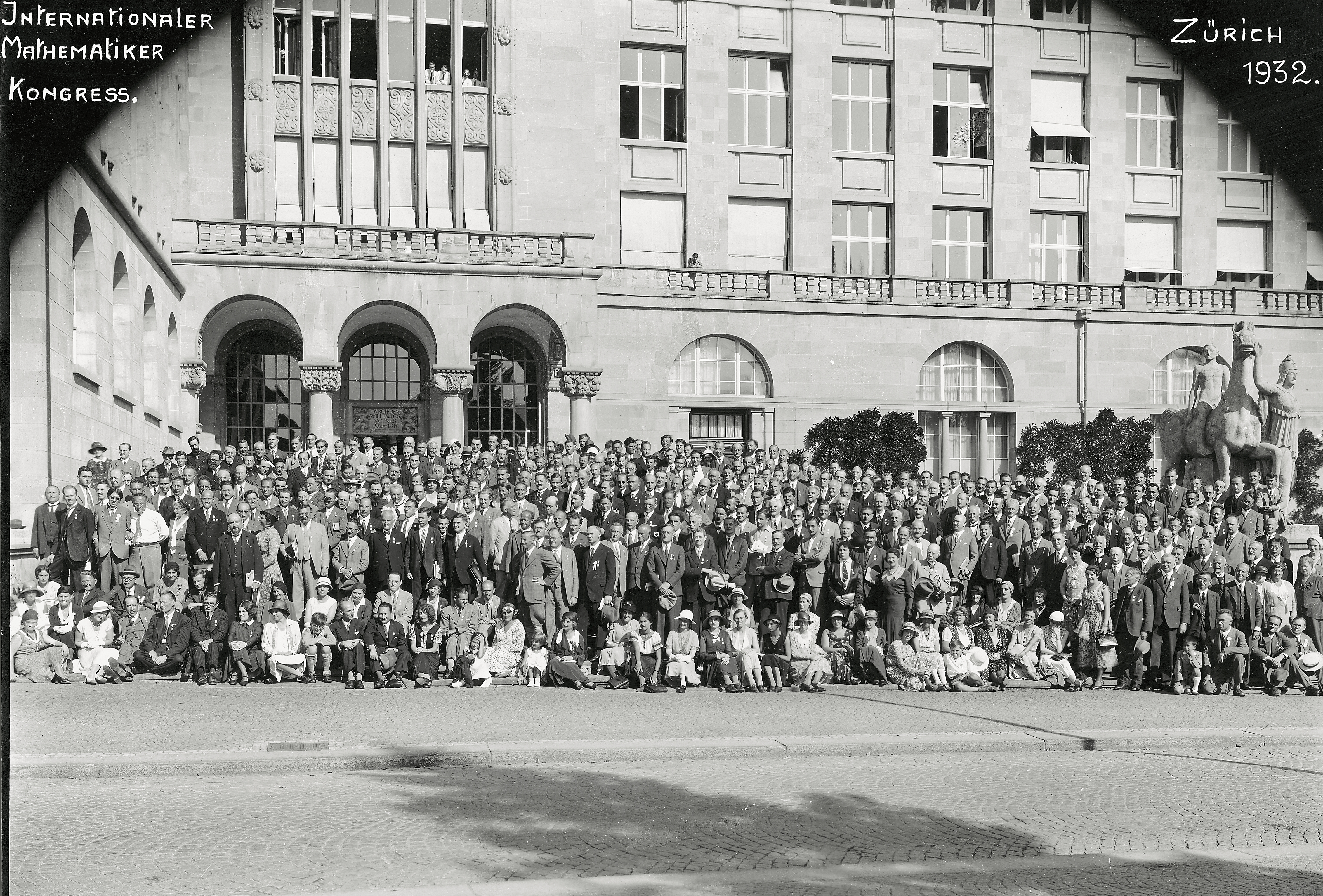 Internationaler Mathematikerkongress, Zürich 1932 – Gruppenbild